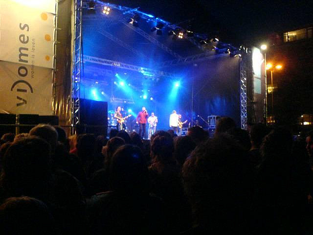 Het Goede Doel - 5 mei - Zoetermeer